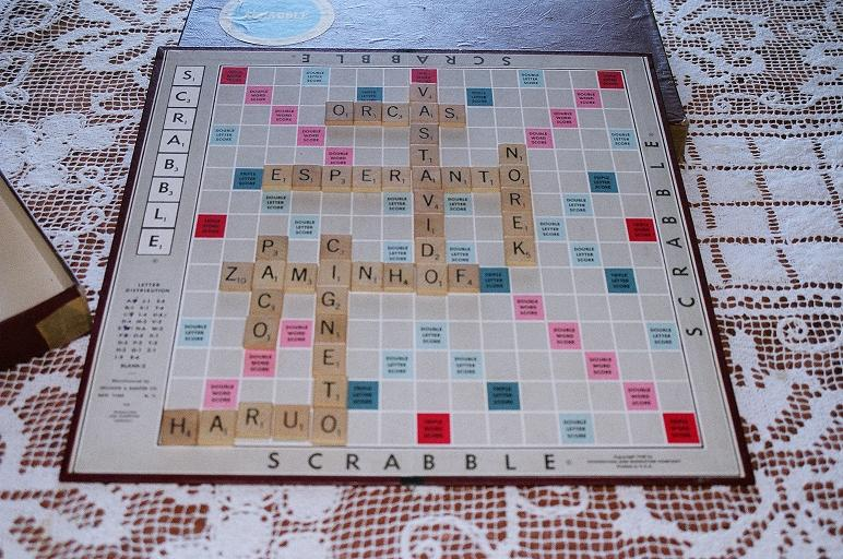 Skrabla ludtabulo kun grava literuma eraro